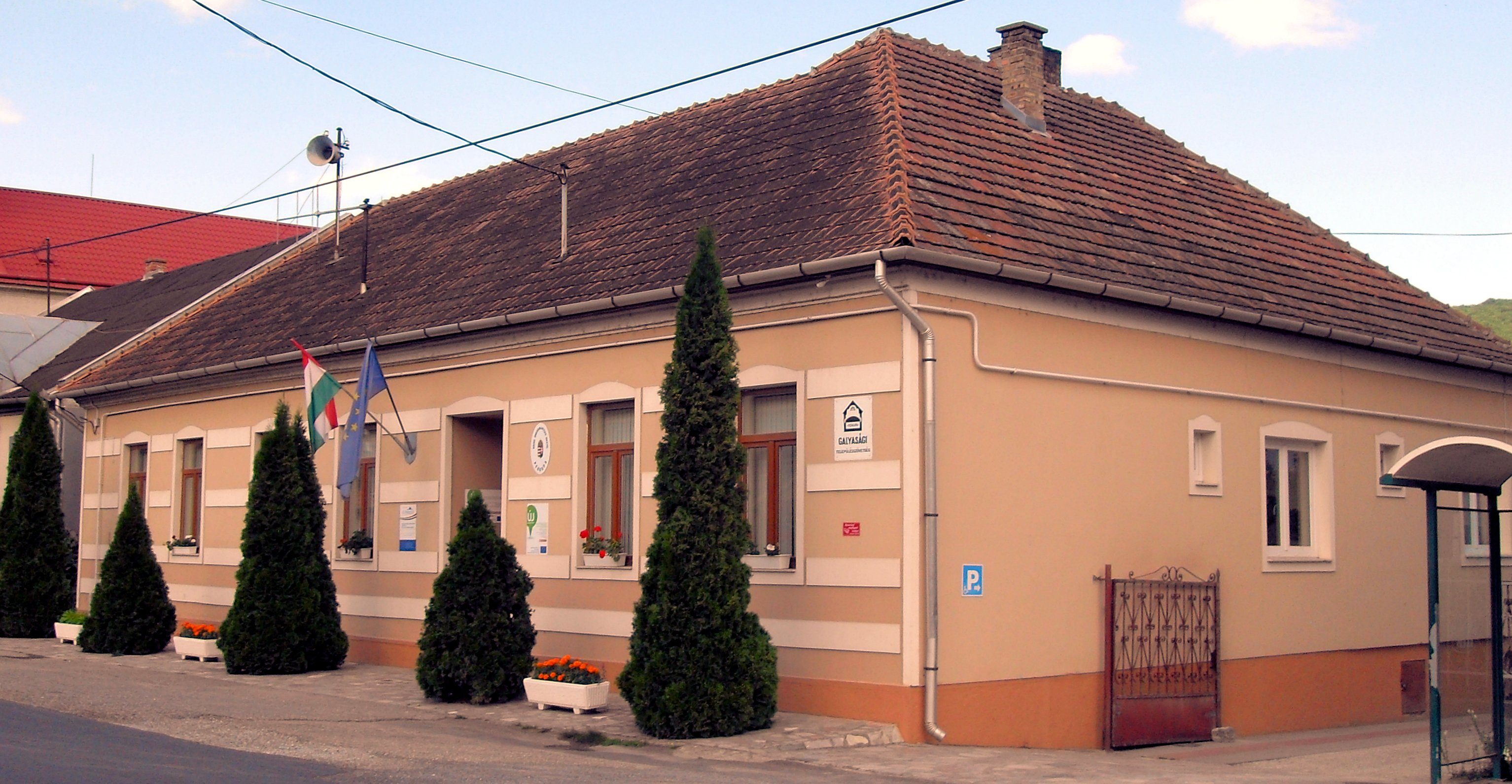 Községi hivatal Perkupa